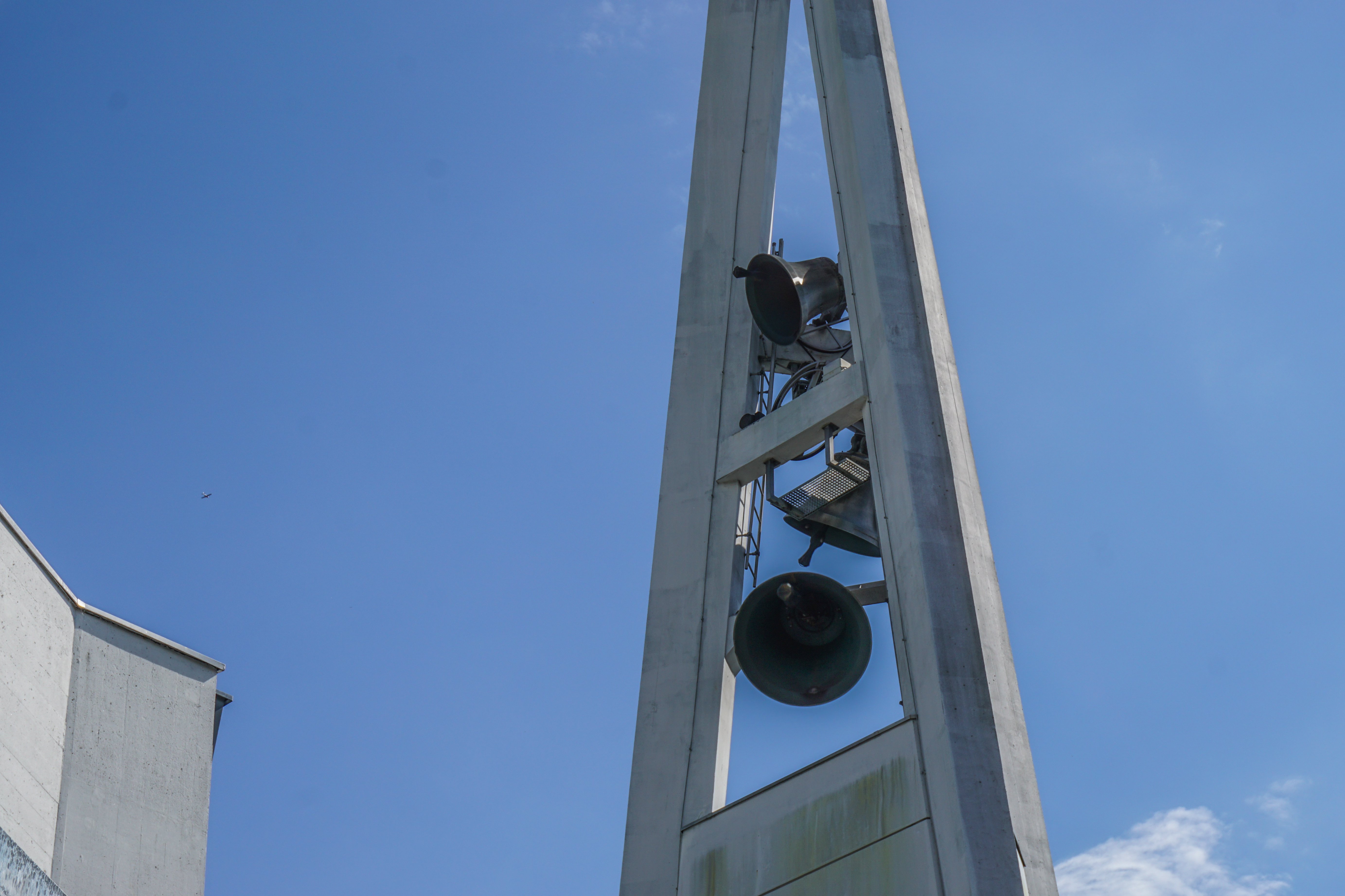 Michaelskirche Wabern, Glocken Vollgeläute